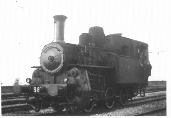 Foto di locomotiva a vapore gruppo 981 a cremagliera in sosta nel piazzale del deposito locomotive di Paola (Cosenza)-autunno del 1971